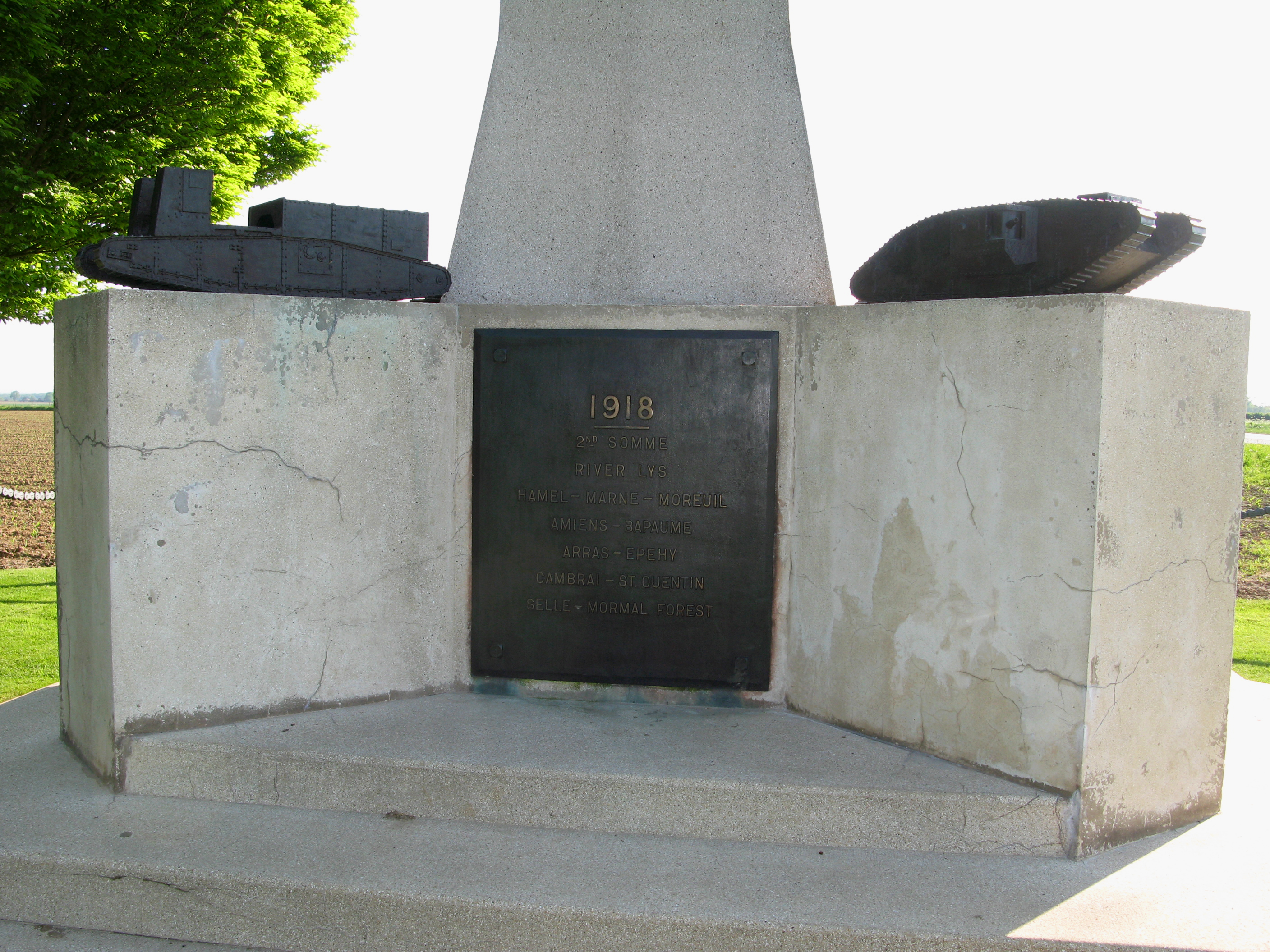 Pozières (Somme, France) Le Monument aux tanks (ici détail d'un des côtés) est situé à la sortie du vilage, en direction de Bapaume. .